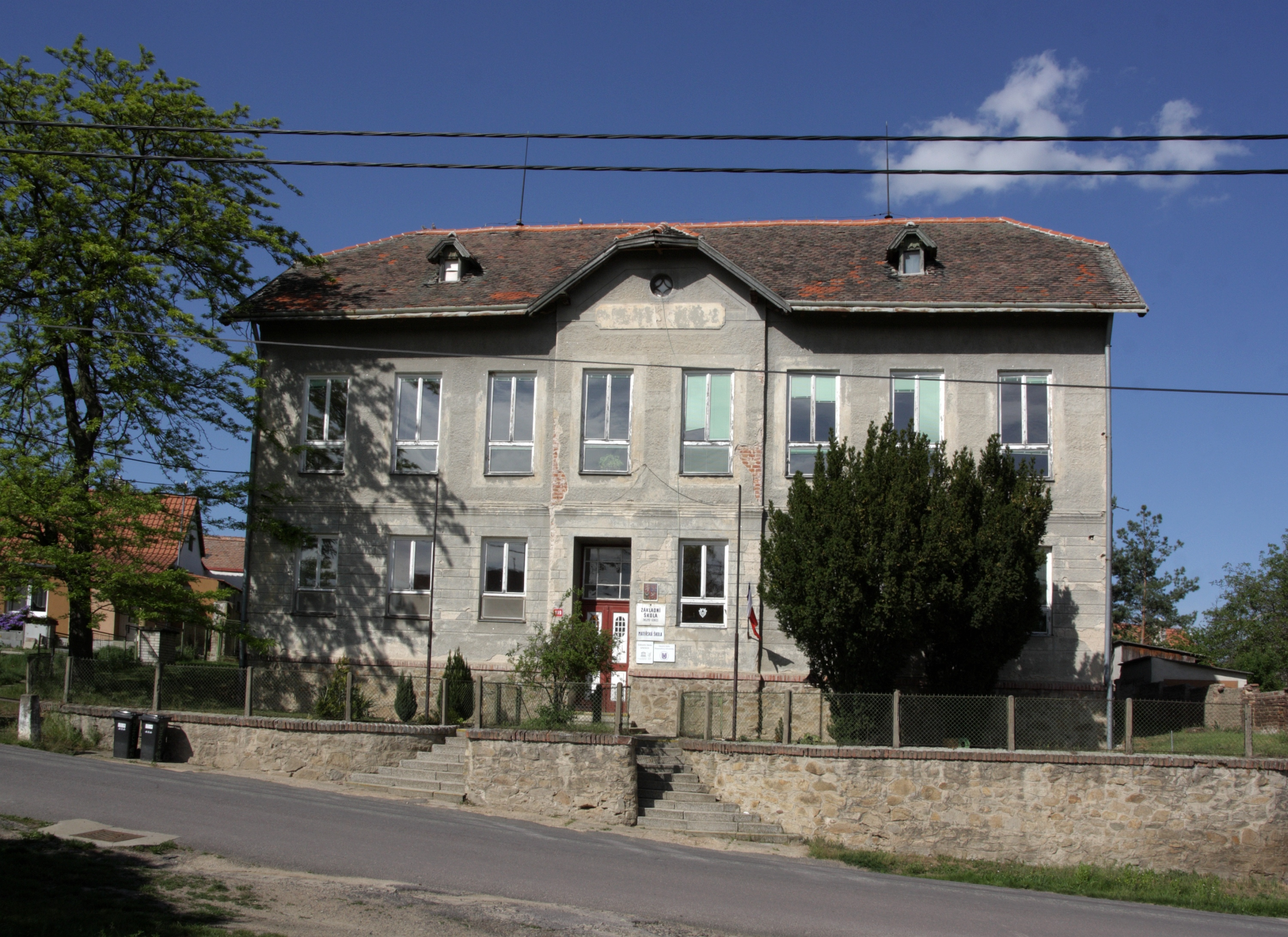 Konice (Znojmo) - základní a mateřská škola.